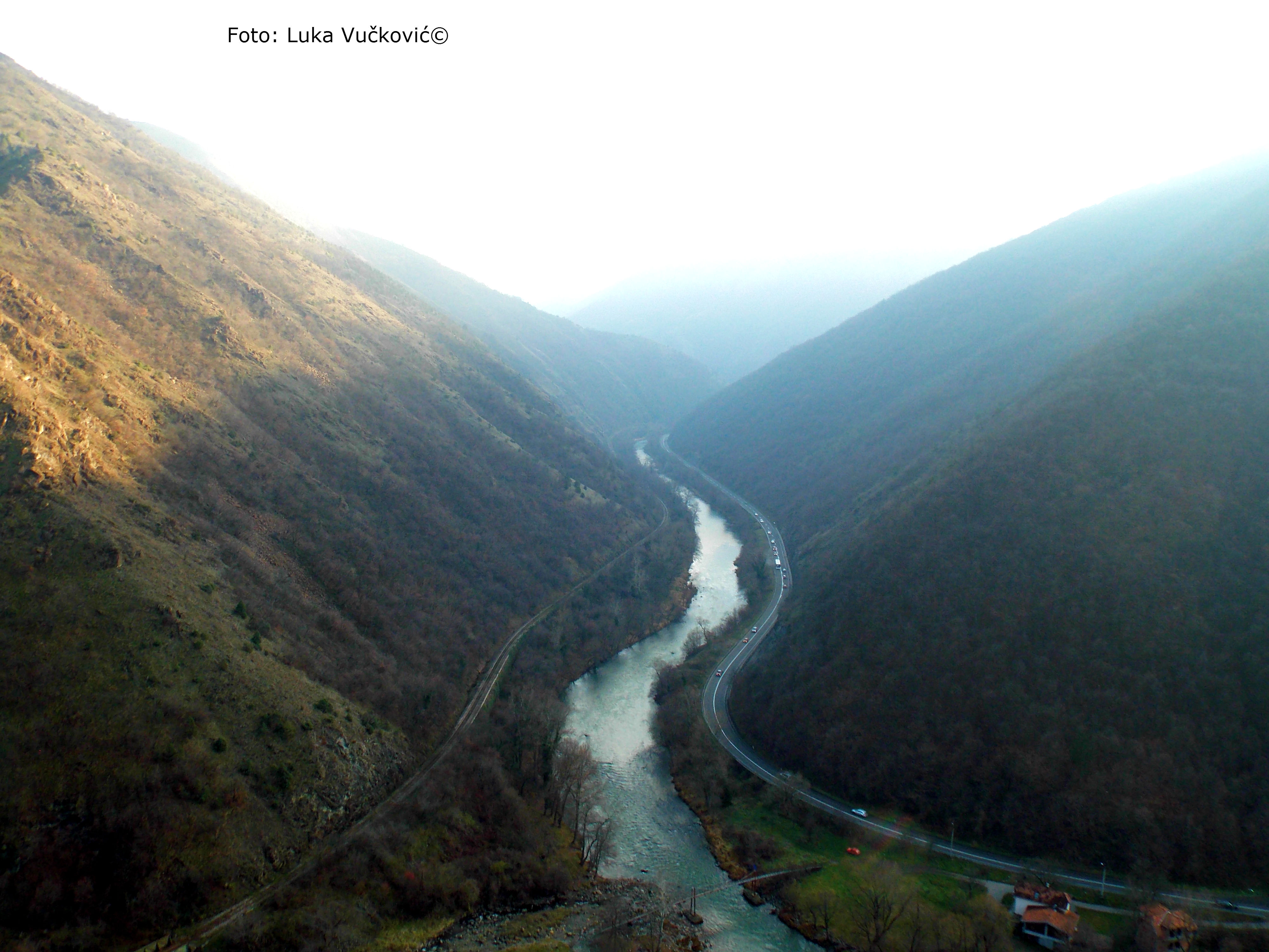 Sa leve strane pruga Kraljevo-Kosovska Mitrovica, a sa desne strane Ibarska magistrala